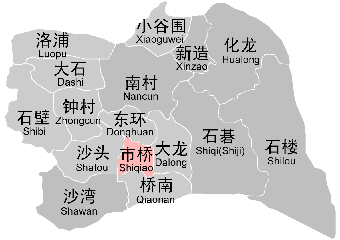 番禺行政区划